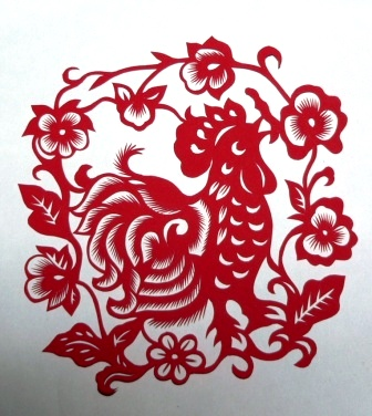 鸡造型剪纸 拍摄